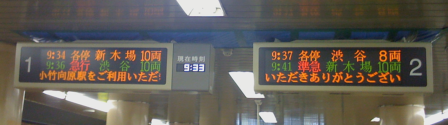 小竹向原駅発車標＠2008年8月